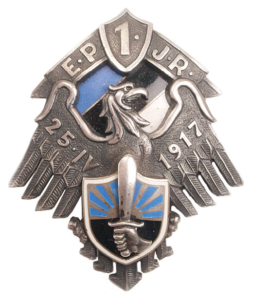 1. Jalaväerügemendi rinnamärk